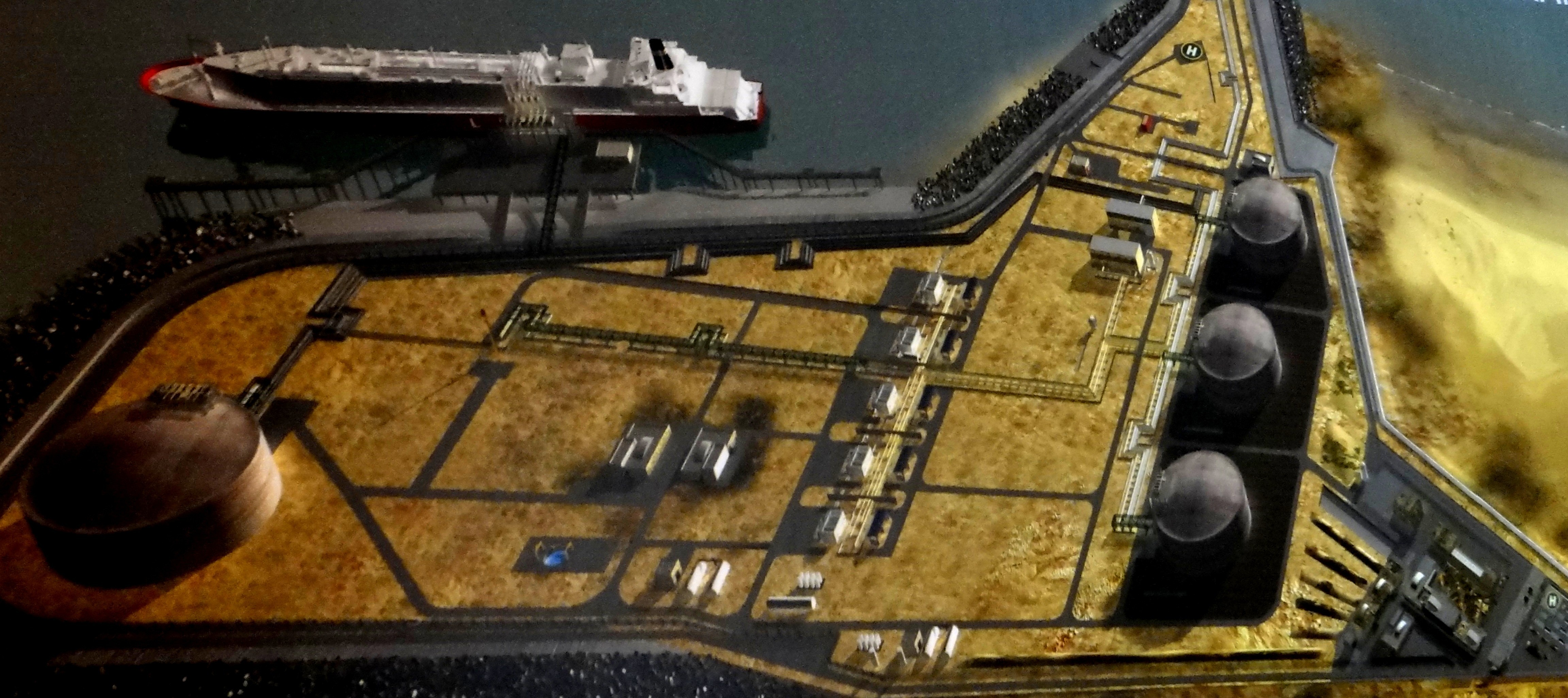 Terminal méthanier de Loon-Plage - Projet additionnel